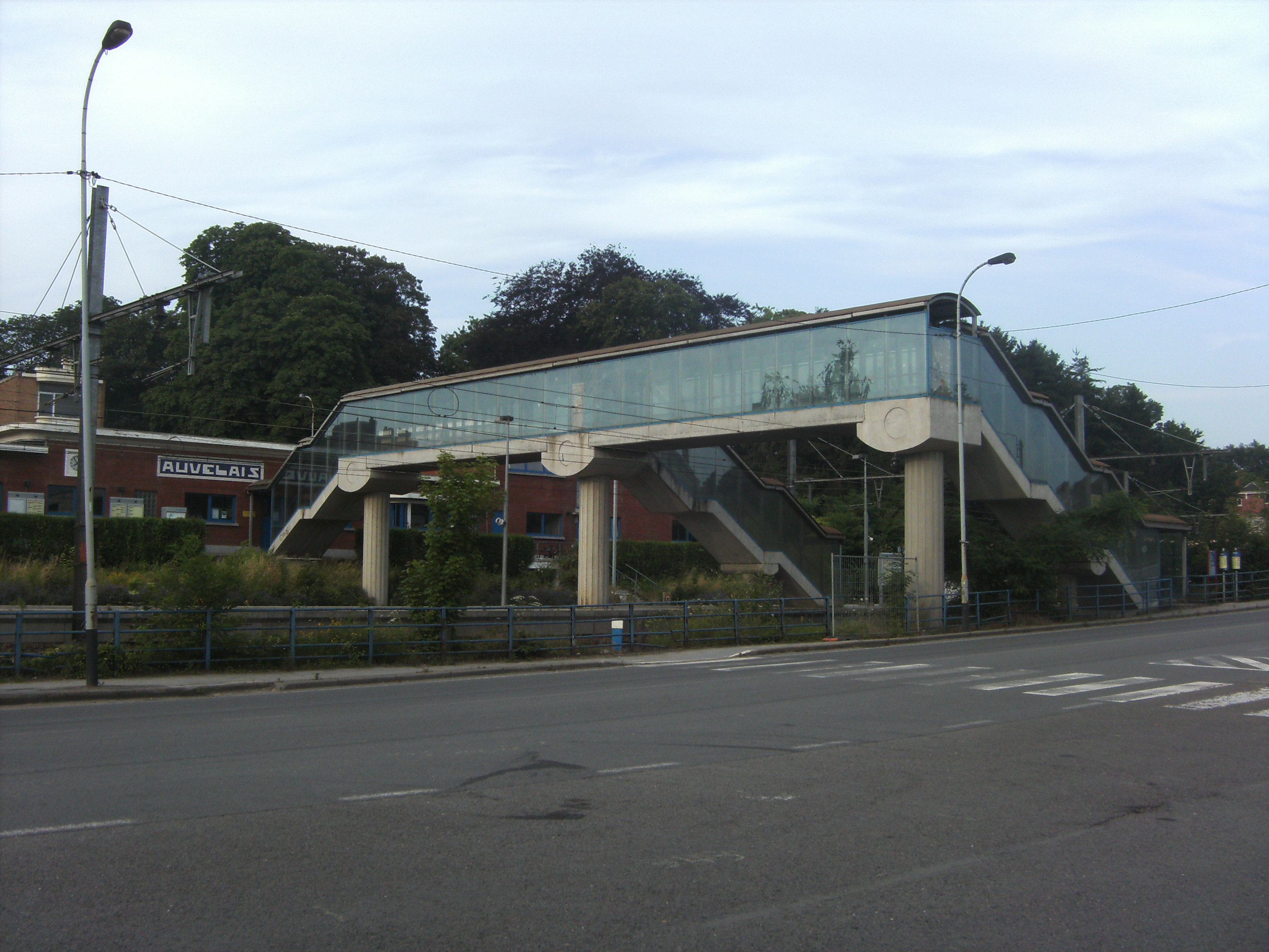 Gare d'Auvelais - passerelle